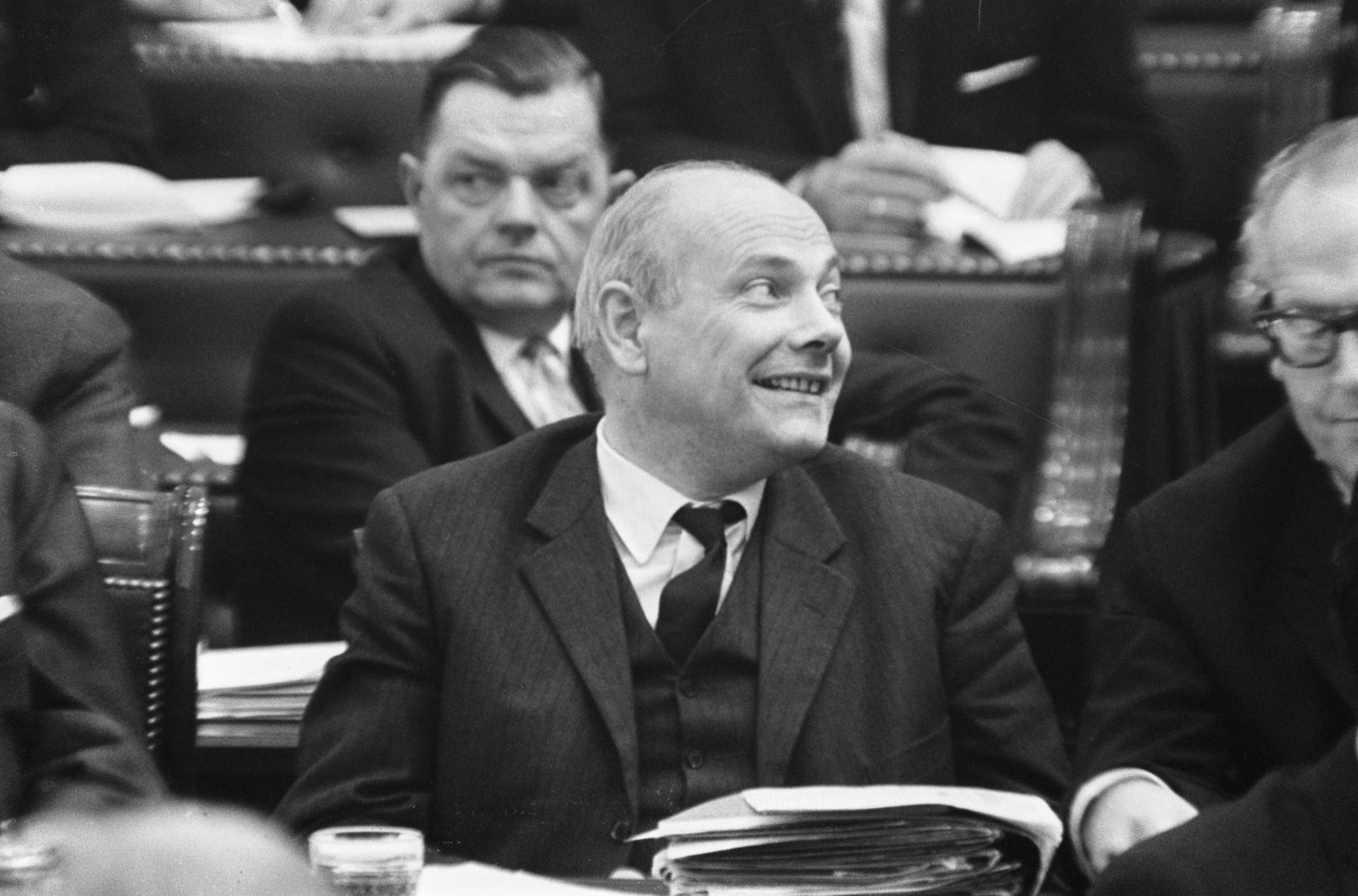 Collectie / Archief : Fotocollectie Anefo Reportage / Serie : De Tweede Kamer behandeld de begroting Beschrijving : Minister Joop den Uyl (PvdA) Annotatie : randnummers negatiefstrook: nr. 24, 25 minister Joop den Uyl, nr. 26, 27 minister Joseph Luns Datum : 11 oktober 1966 Locatie : Den Haag, Zuid-Holland Trefwoorden : overheidsbegrotingen, parlementaire debatten, parlementariërs, politiek, portretten Persoonsnaam : Uyl, Joop den Fotograaf : Fotograaf Onbekend / Anefo Auteursrechthebbende : Nationaal Archief Materiaalsoort : Negatief (zwart/wit) Nummer archiefinventaris : bekijk toegang 2.24.01.05 Bestanddeelnummer : 919-6693